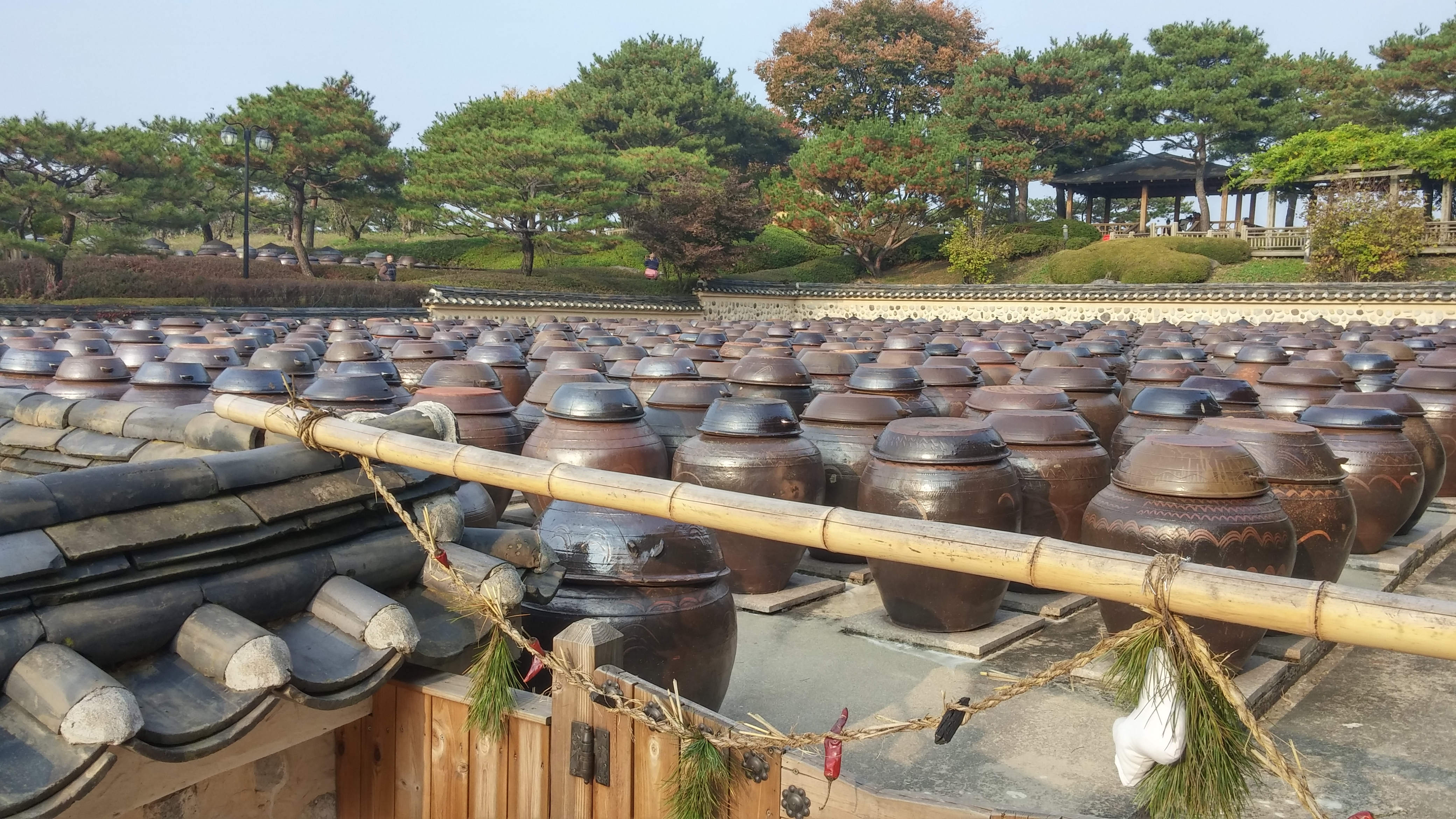 안성 서일농원 (5)